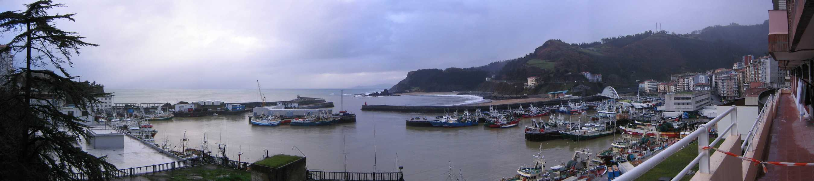 Vista general del puerto de Ondarroa, Vizcaya, País Vaco, España.